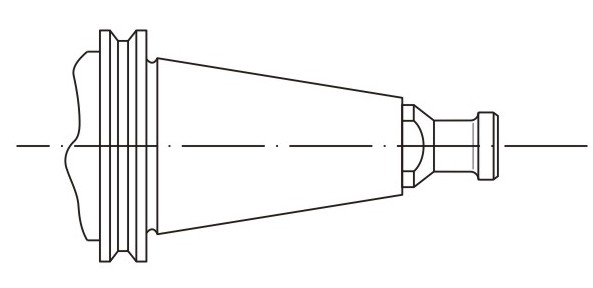 Steilgegel für die Aufnahme von rotierenden Werkzeugen in die Spindel von Werkzeugmaschinen